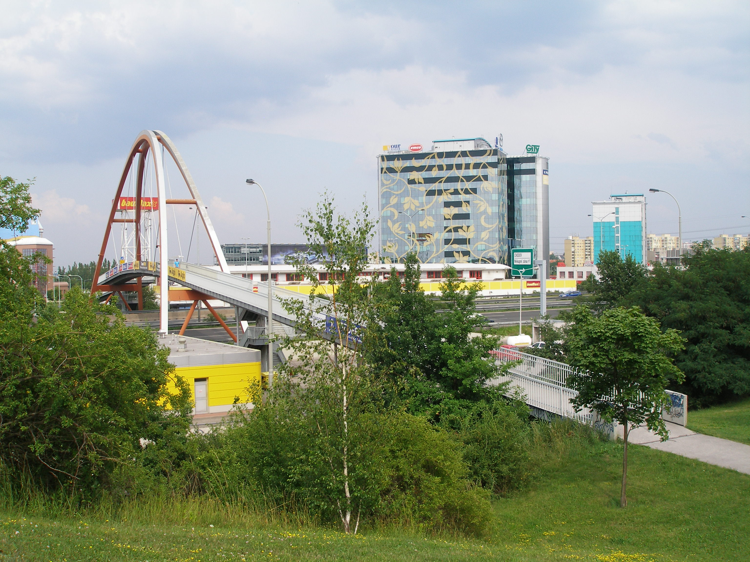 Lávka přes dálnici D1 na pražském Chodově.